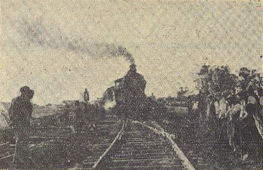 Trabalhos de via durante a expansão da estação ferroviária do Pinhal Novo, no Alentejo, em Portugal. A fotografia representa o momento em que o primeiro comboio vai passar por uma nova via. Esta imagem foi publicada na Gazeta dos Caminhos de Ferro n.º 1127, de 1 de Dezembro de 1934, e digitalizada pela Hemeroteca Municipal de Lisboa.